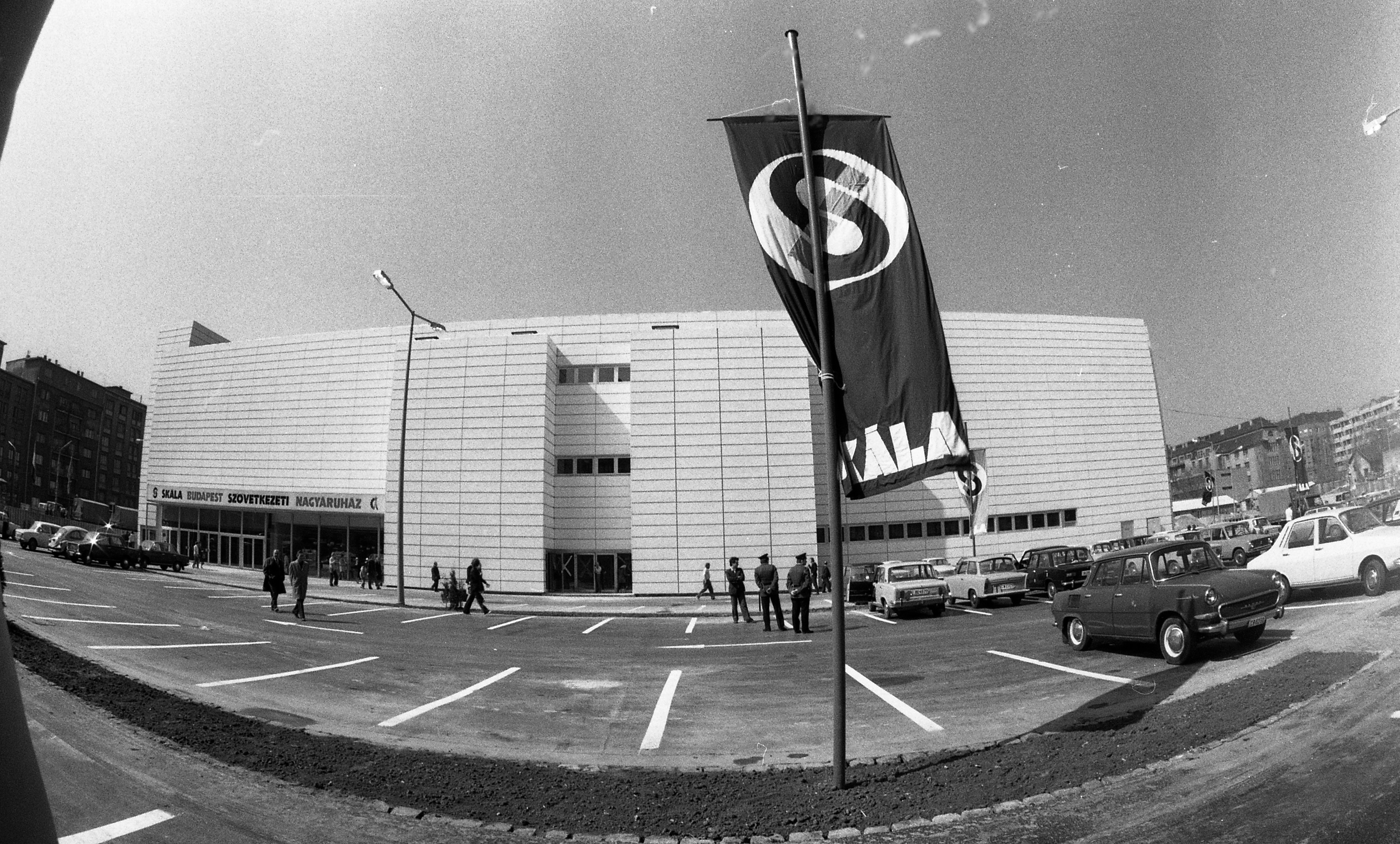 Október huszonharmadika (Schönherz Zoltán) utca, Skála Budapest Szövetkezeti Nagyáruház, a felvétel a megnyitáskor készült. Parkoló a Bercsényi utcánál. Location: Hungary, Budapest XI. Tags: Skála department store, Budapest, car park, automobile, Skoda-brand, Trabant-brand, Lada-brand, Dacia-brand Title: Október huszonharmadika (Schönherz Zoltán) utca, Skála Budapest Szövetkezeti Nagyáruház, a felvétel a megnyitáskor készült. Parkoló a Bercsényi utcánál.